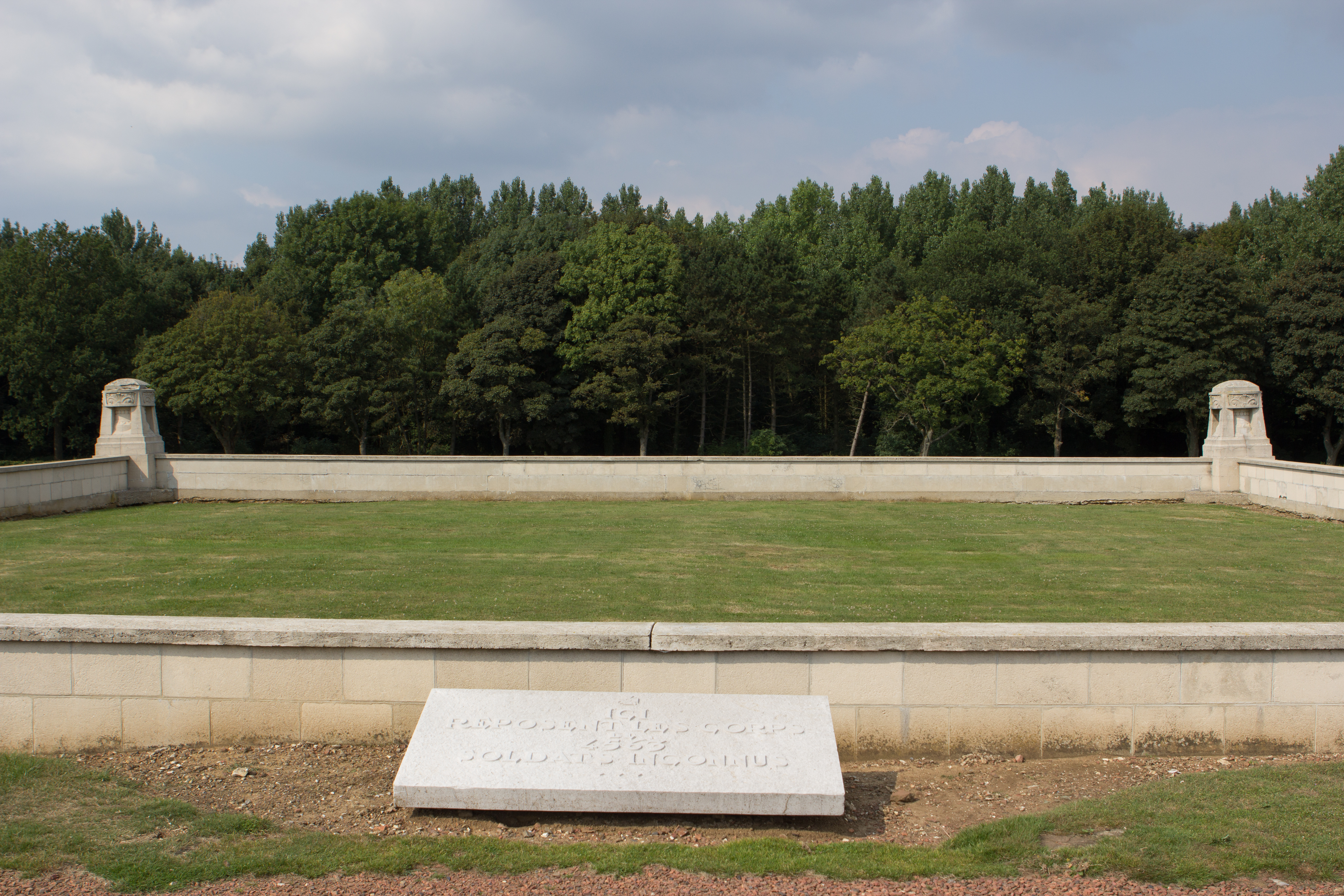 Nécropole nationale de Notre-Dame-de-Lorette / Ablain-Saint-Nazaire, Pas-de-Calais, France